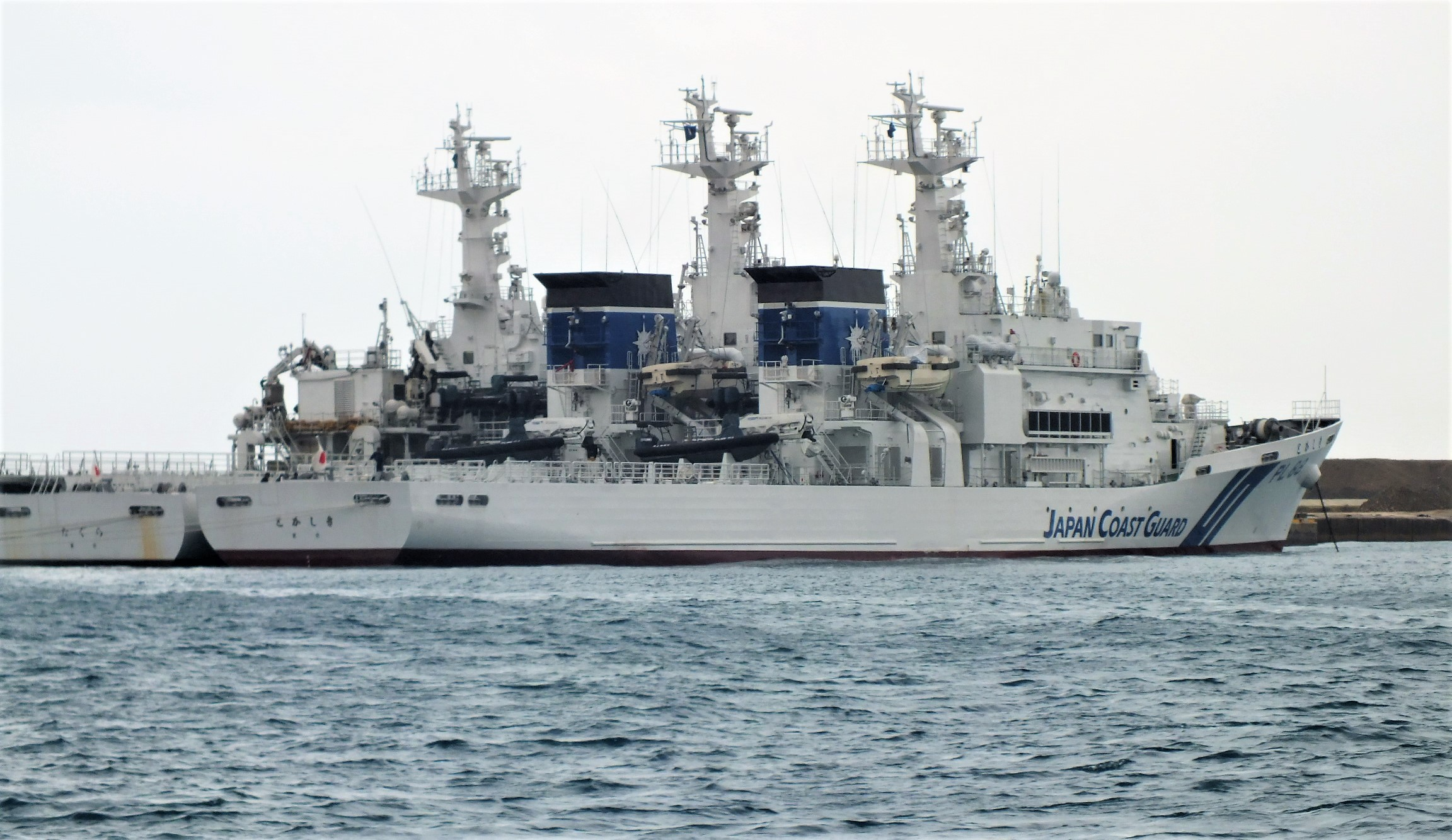 2016-02-27 Japan Coast Guard PL82 Nagura at the Port at the Port of Ishigaki とかしき・なぐら 石垣港 くにがみ型巡視船（英語: Kunigami-class patrol vessel） 海上保安庁の巡視船の船級 区分上はPL（Patrol vessel Large）型、公称船型は1,000トン PL-88とかしき PL-82 なぐら